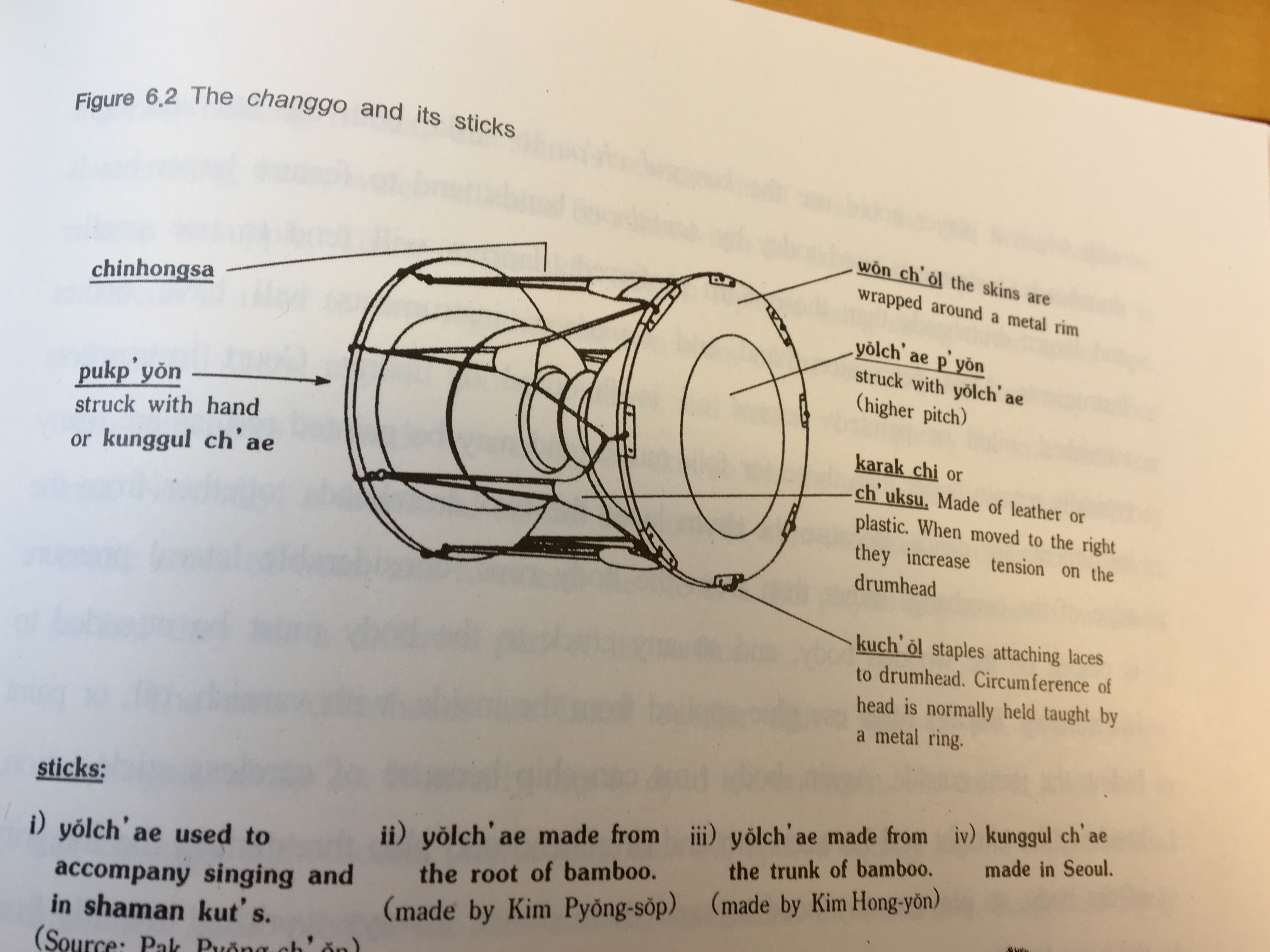 Foto de las partes del insturmento con las palabras en el idioma original